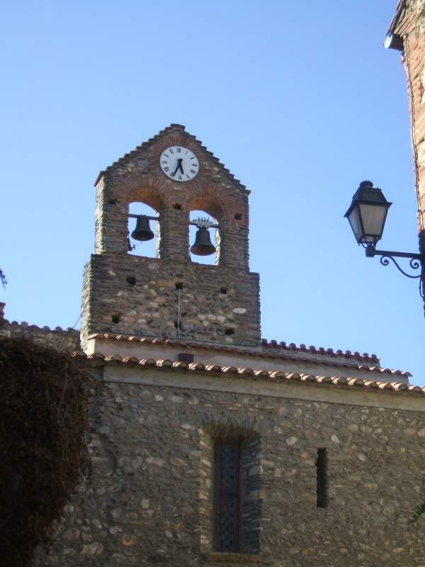 Vivès (66 - Pyrénées-Orientales) : clocher-mur de l'église paroissiale Saint Michel